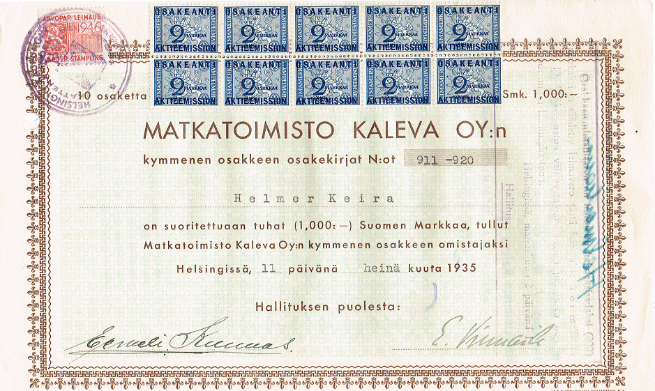 Osakekirja